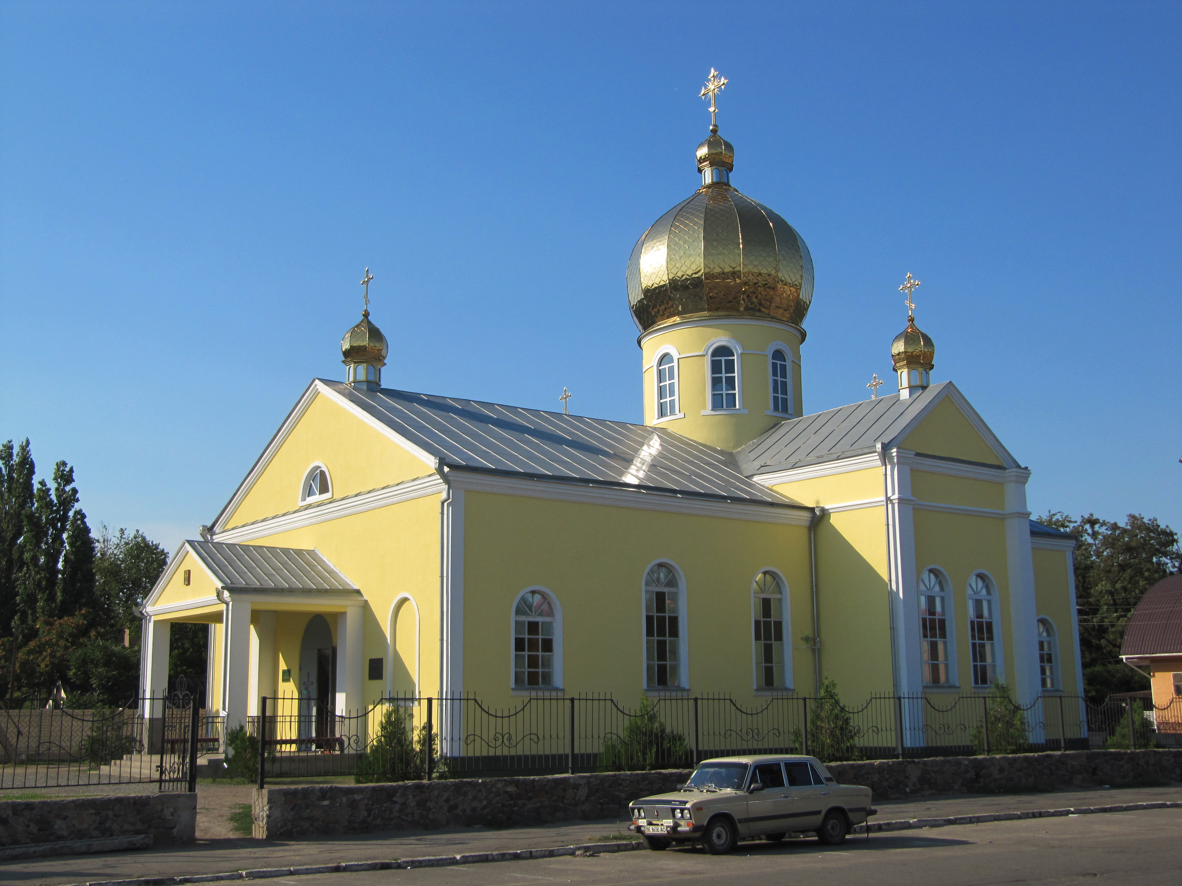 Собор Вознесения Господнего в Вознесенске. Миколаївська весна у Вікіпедії